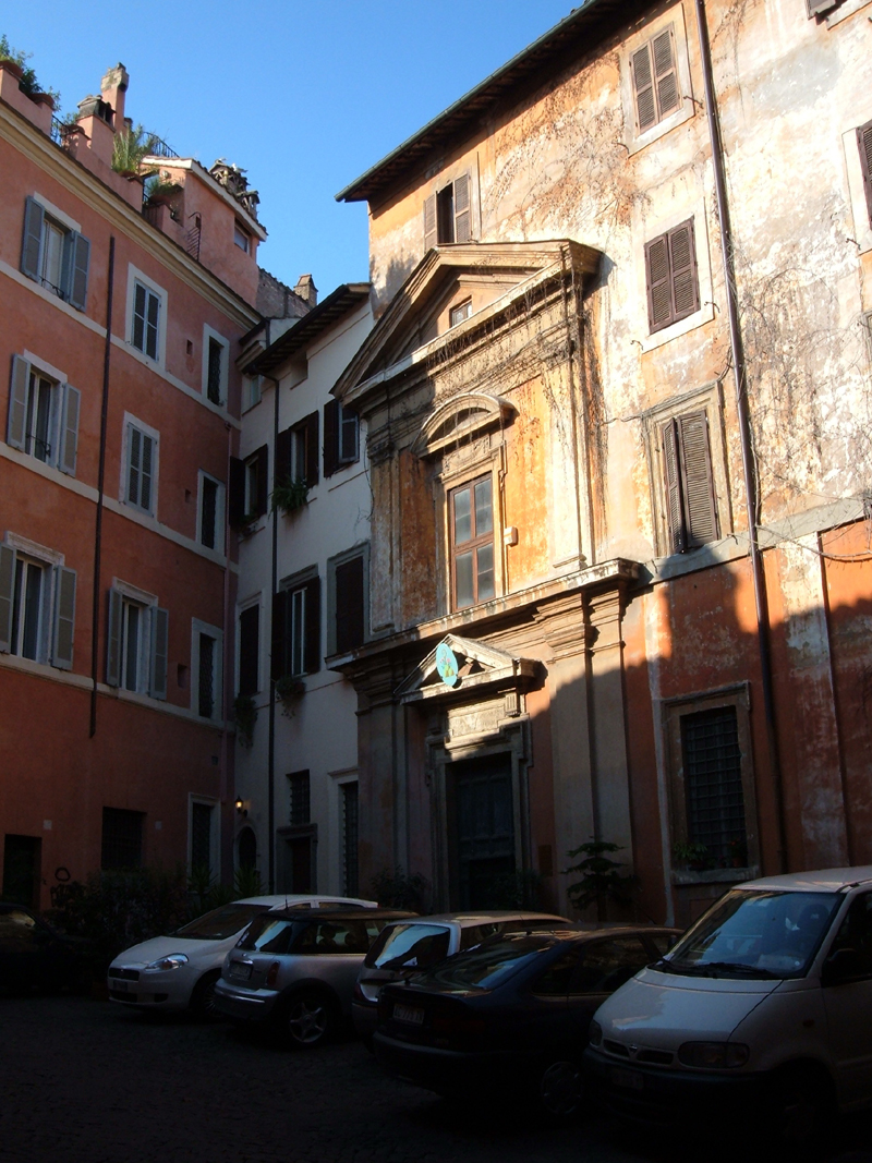 Chiesa di Santo Stefano del Cacco, a Roma, nel rione Pigna. Foto personale.